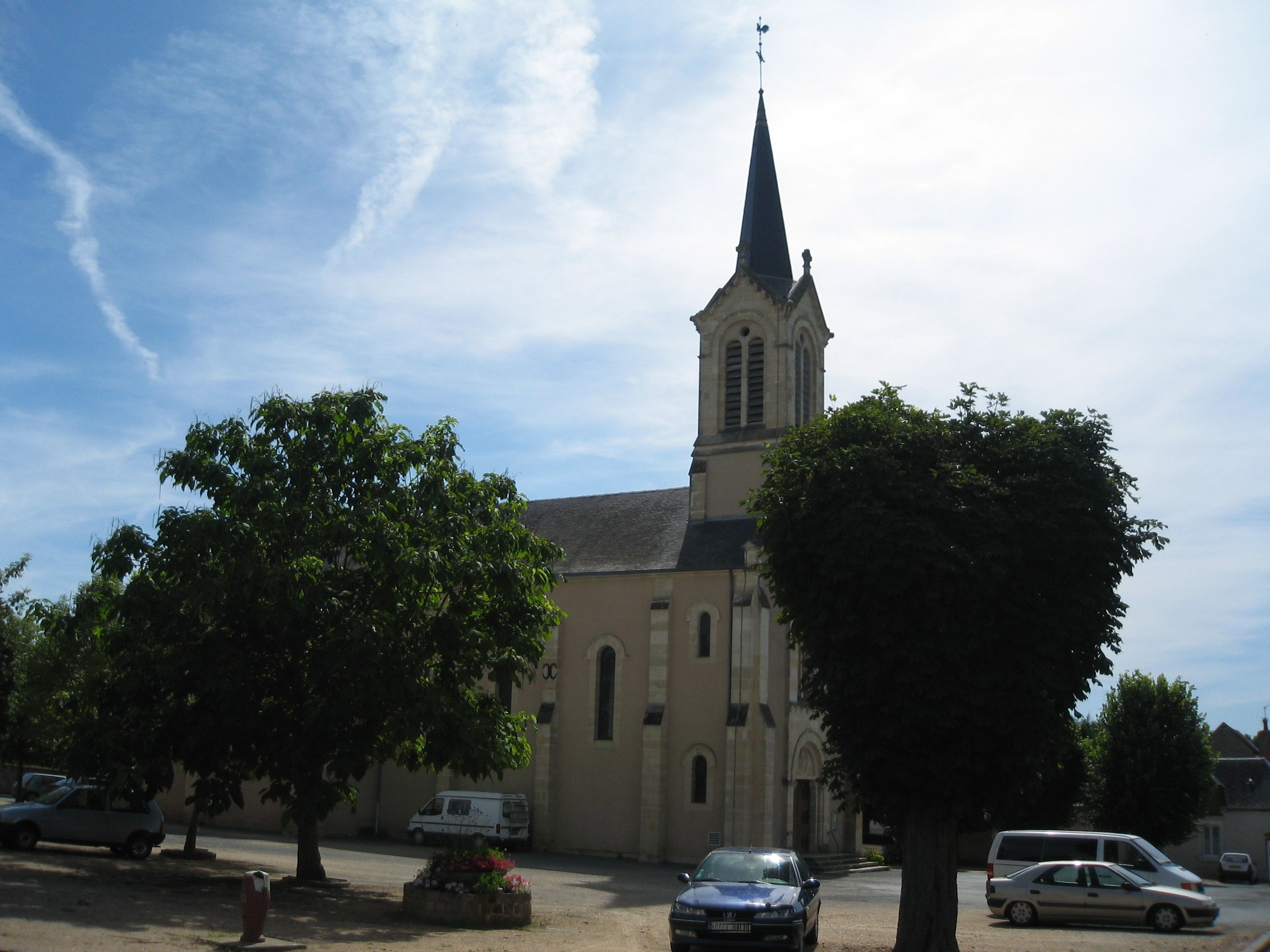 Eglise saint Paul, du XIX, de style gothique (Lury-sur-Arnon).